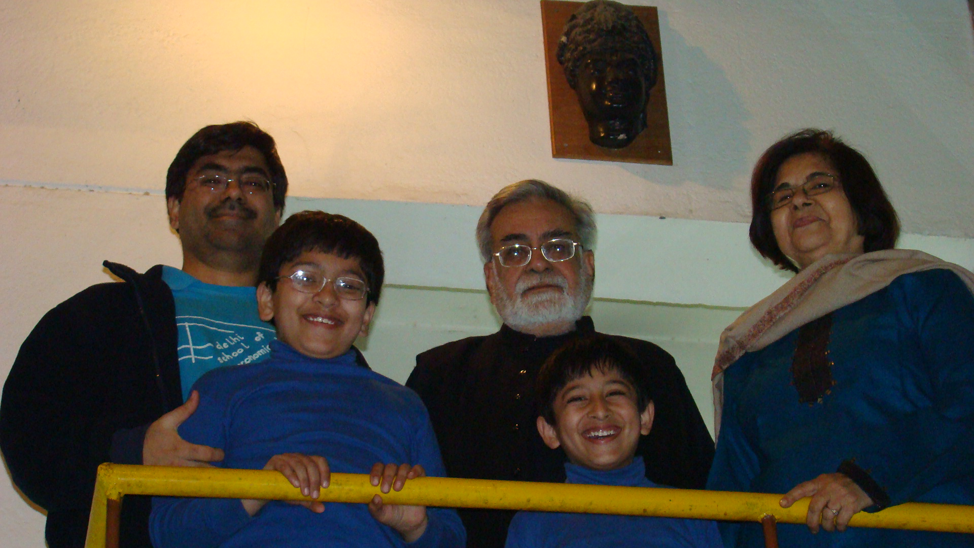 कालजयी कथाकार एवं मनीषी डॉ. नरेन्द्र कोहली : अपनी धर्मपत्नी डॉ. मधुरिमा कोहली, अपने ज्येष्ठ पुत्र कार्तिकेय एवं अपने पौत्रों के साथ